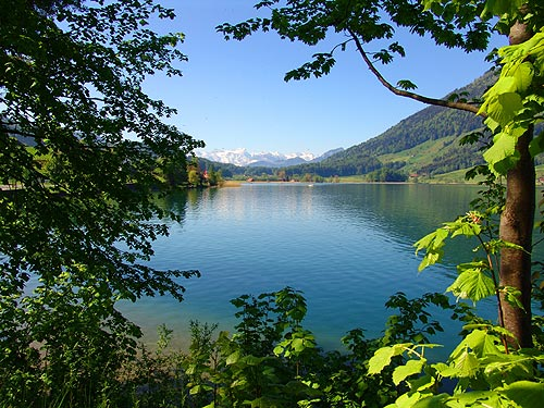 Lake Ägeri (Ägerisee) at Morgarten, Switzerland